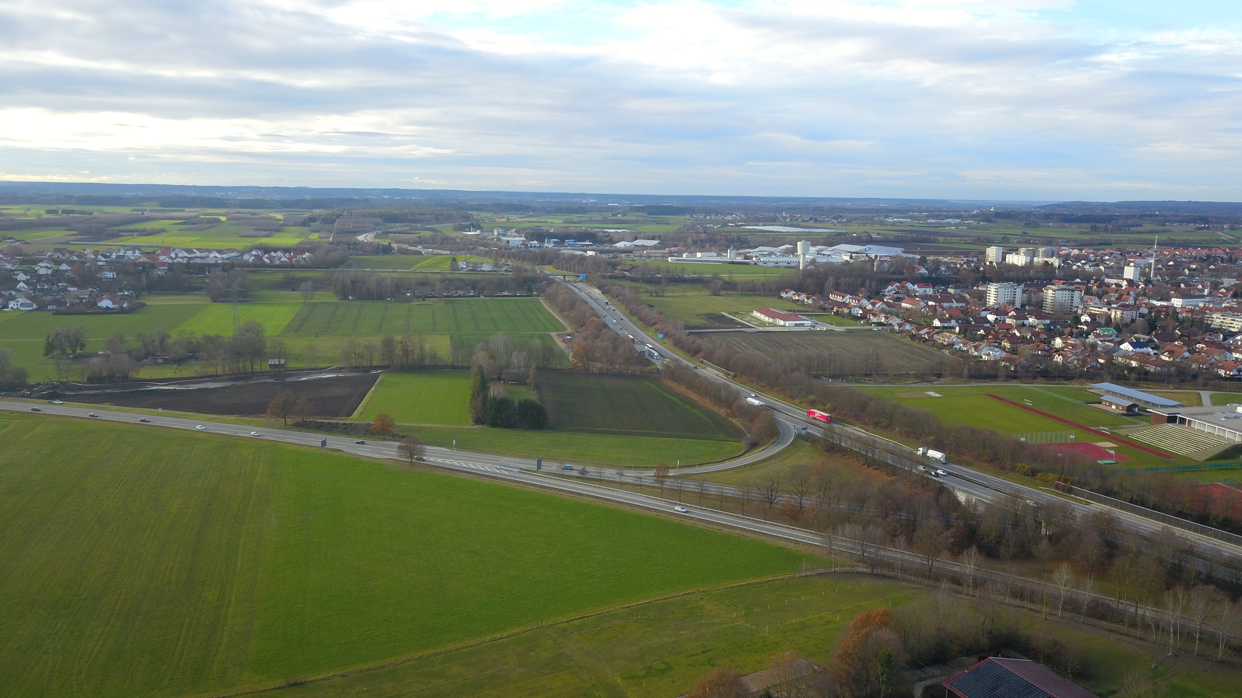 Einmündung/Abzweig der Bundesstrasse 12 in die A96 bei Buchloe. Blick Richtung Süden